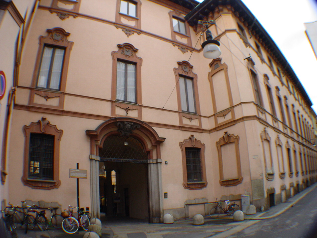 Facciata di Palazzo Clerici